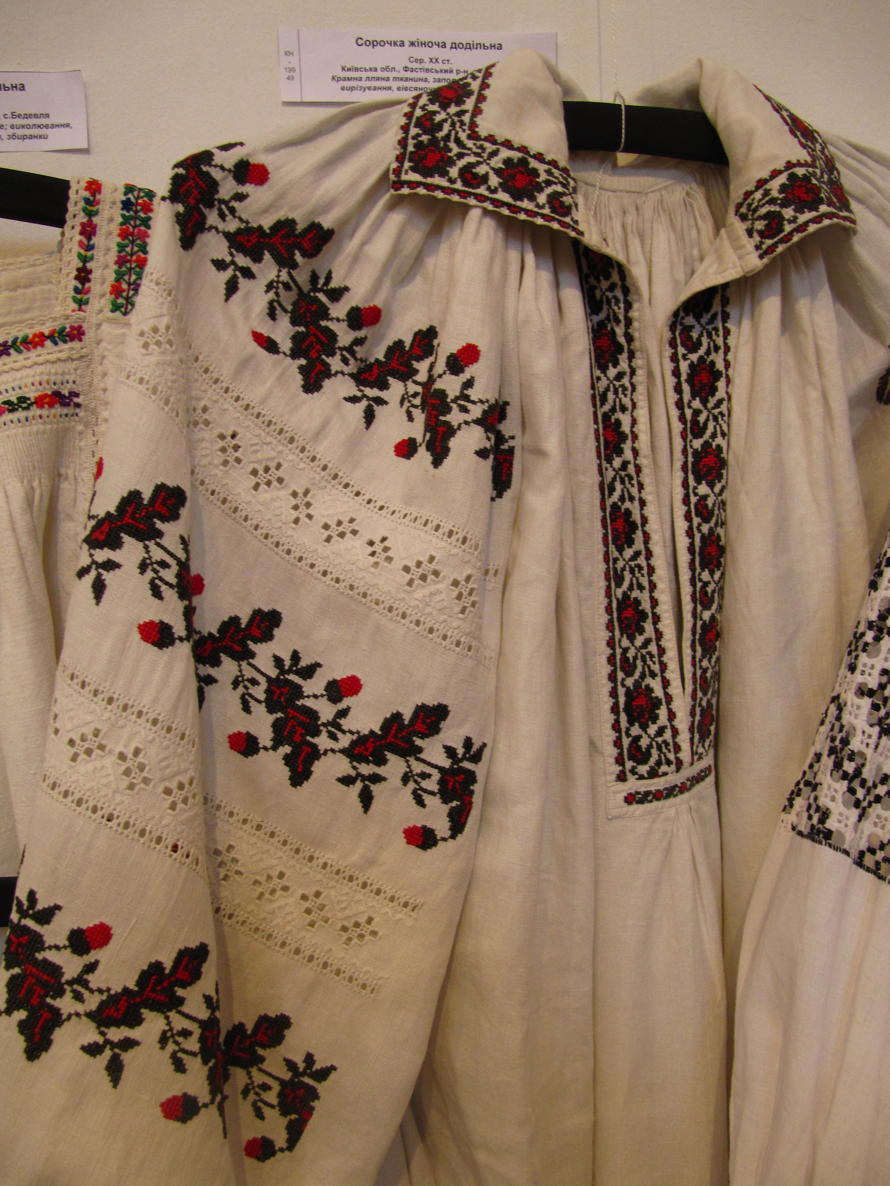 Жіноча додільна сорочка. Середина 20 ст. Київська обл. Хвастівський р. с. Оленівка Виставка в музеї Івана Гончара (Київ).